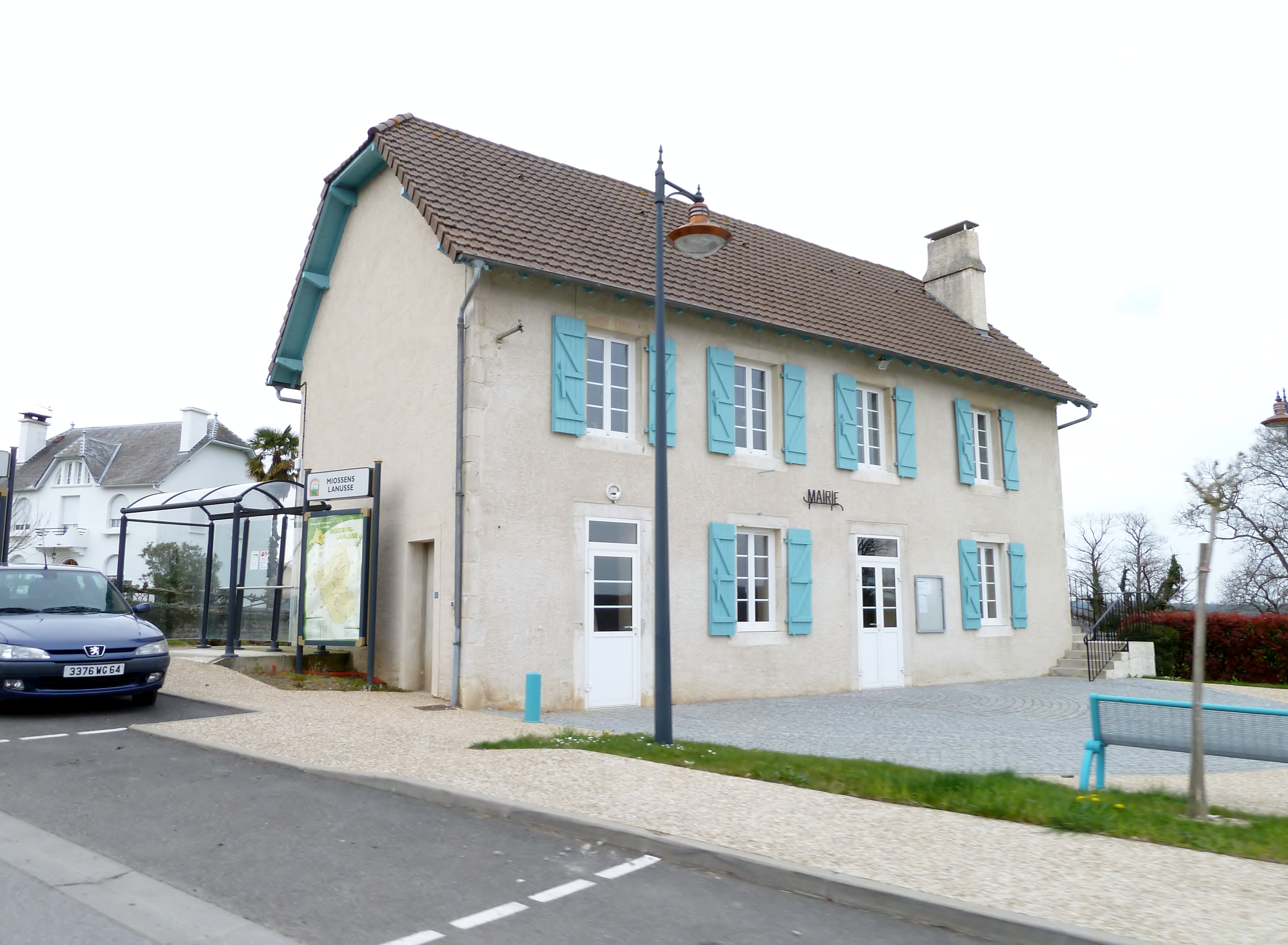 Mairie de Miossens-Lanusse